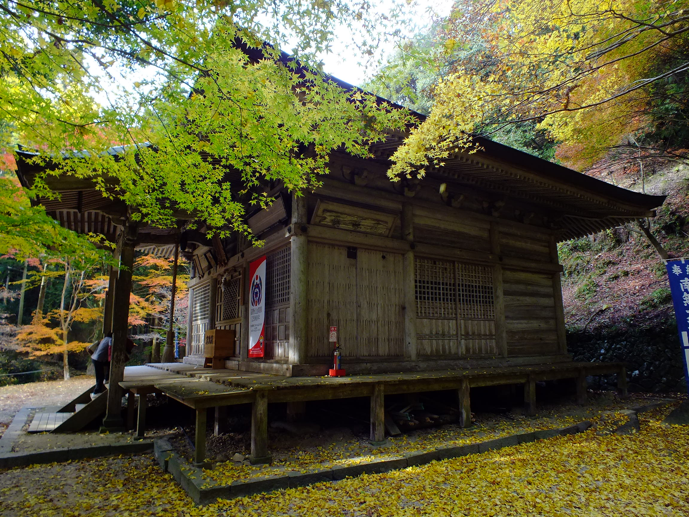 2014-11-24 Sekiganji 石龕寺